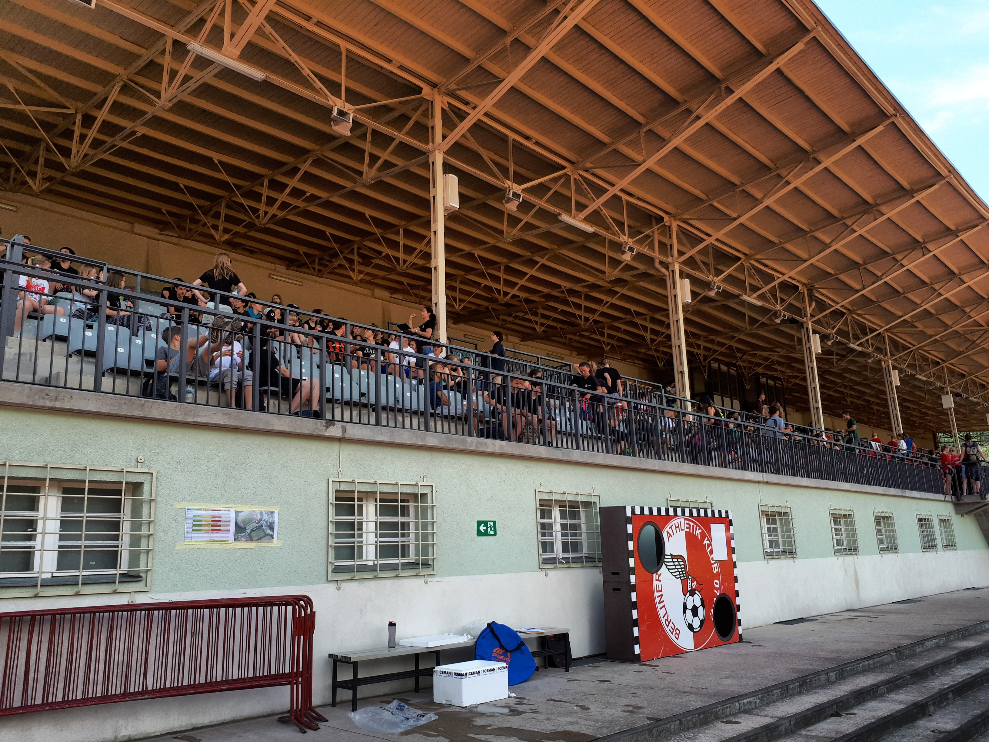 Moabit Poststadion Tribüne